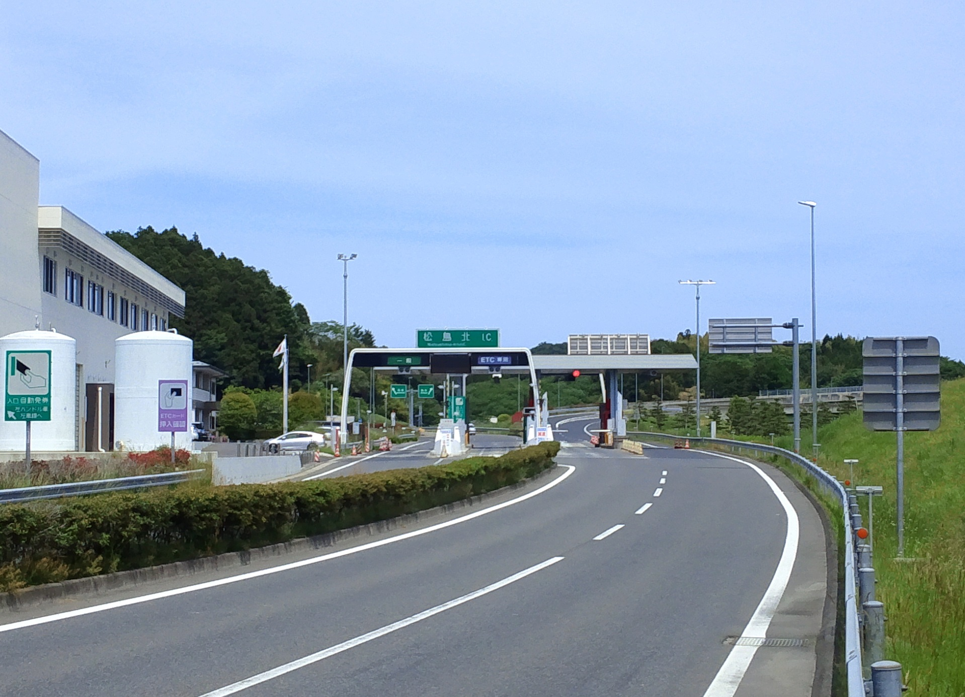 三陸自動車道松島北インターチェンジ料金所付近（一般道歩道から撮影）